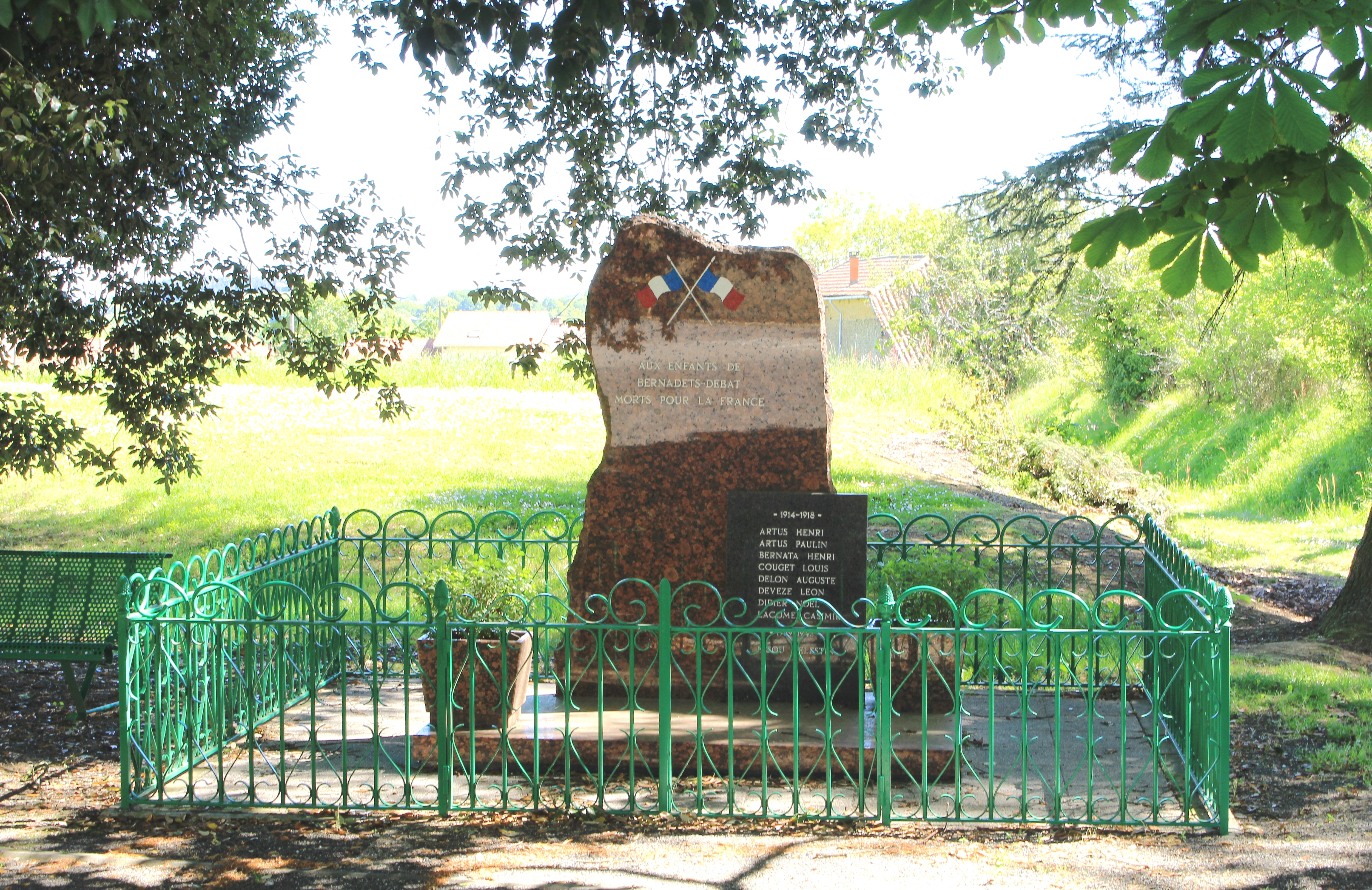 Monument aux morts de Bernadets-Debat (Hautes-Pyrénées)